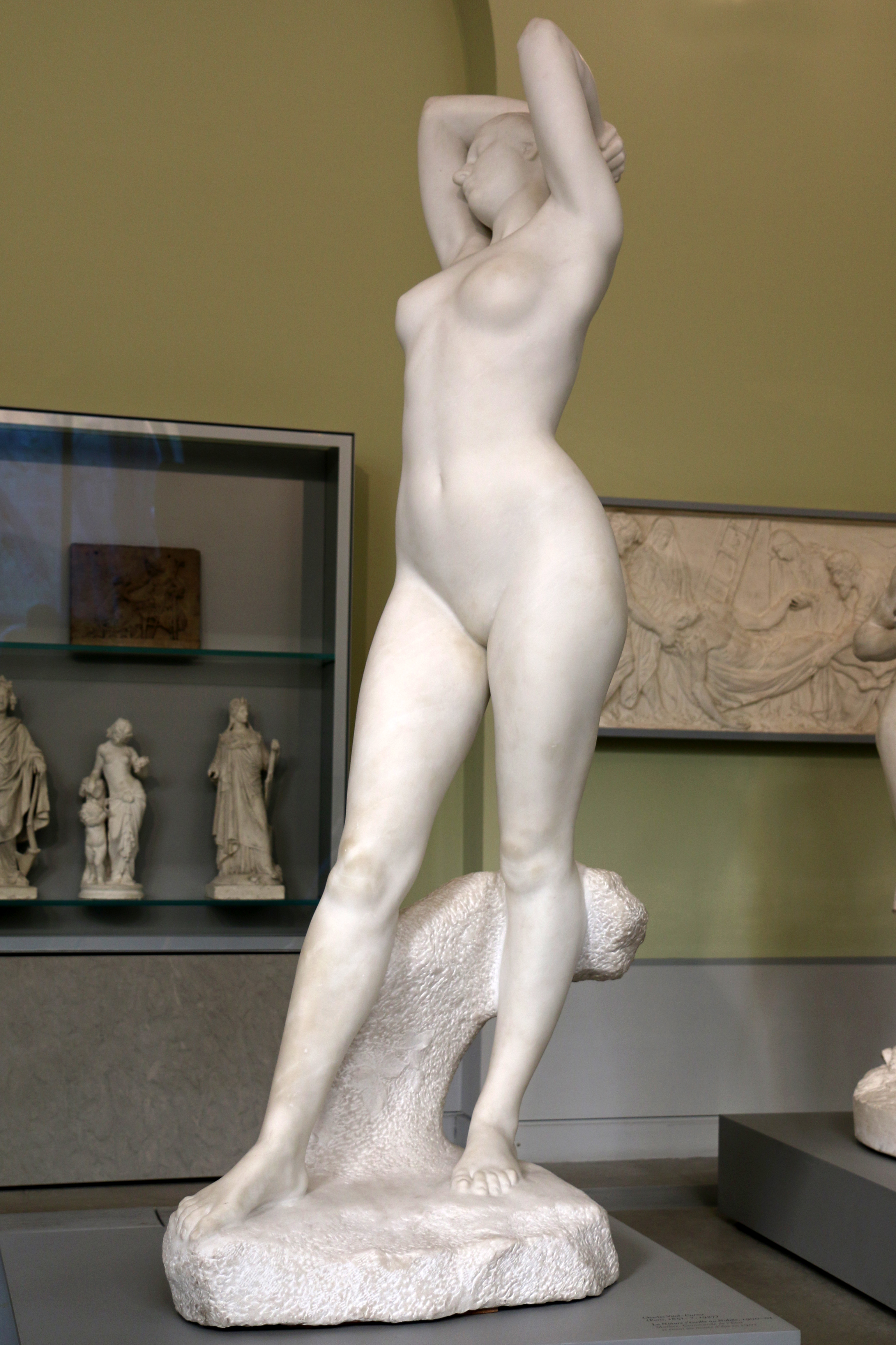 ArtistCreator:Charles Vital-CornuTitle